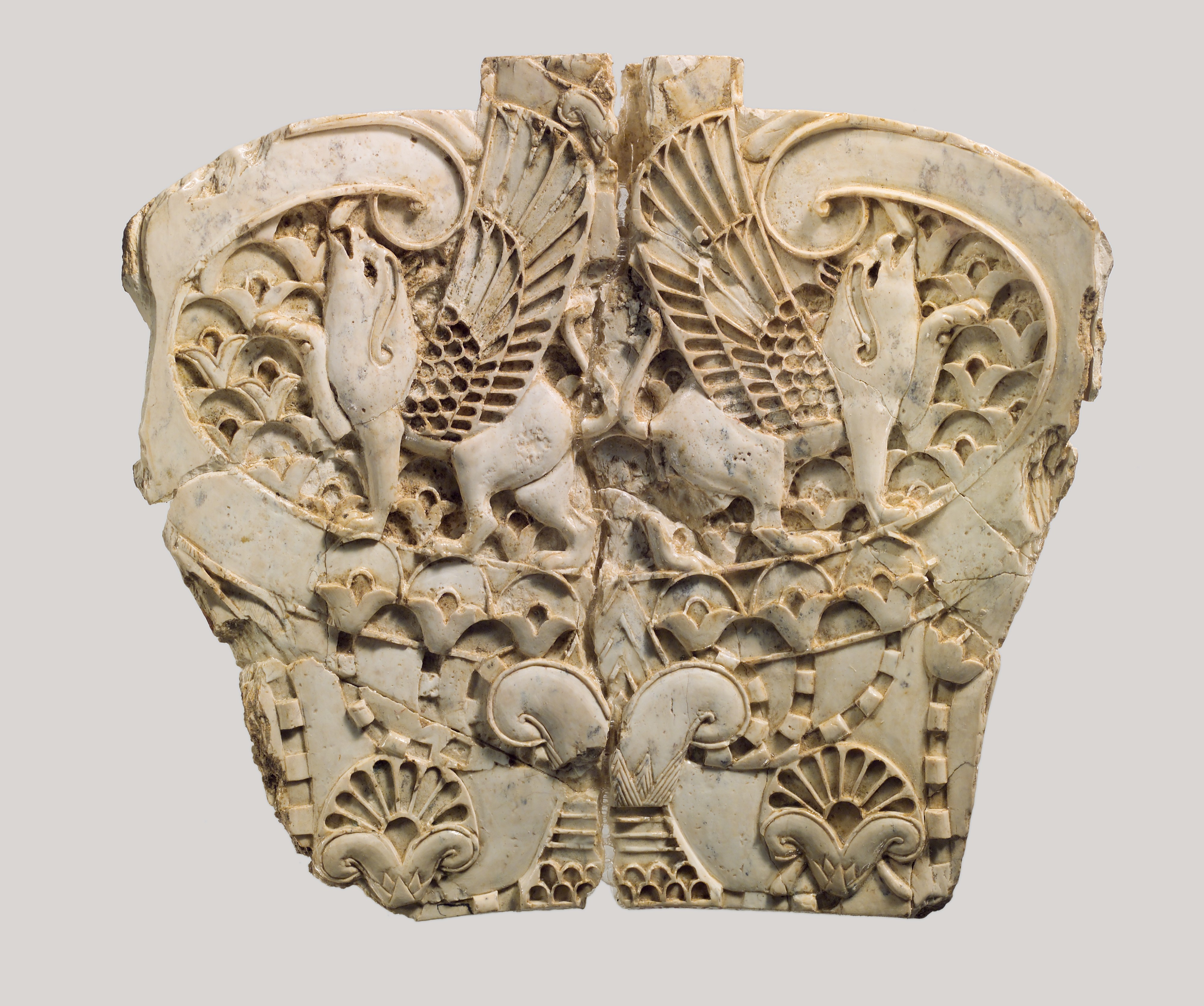 Assyrian; Relief; Ivory/Bone-Reliefs